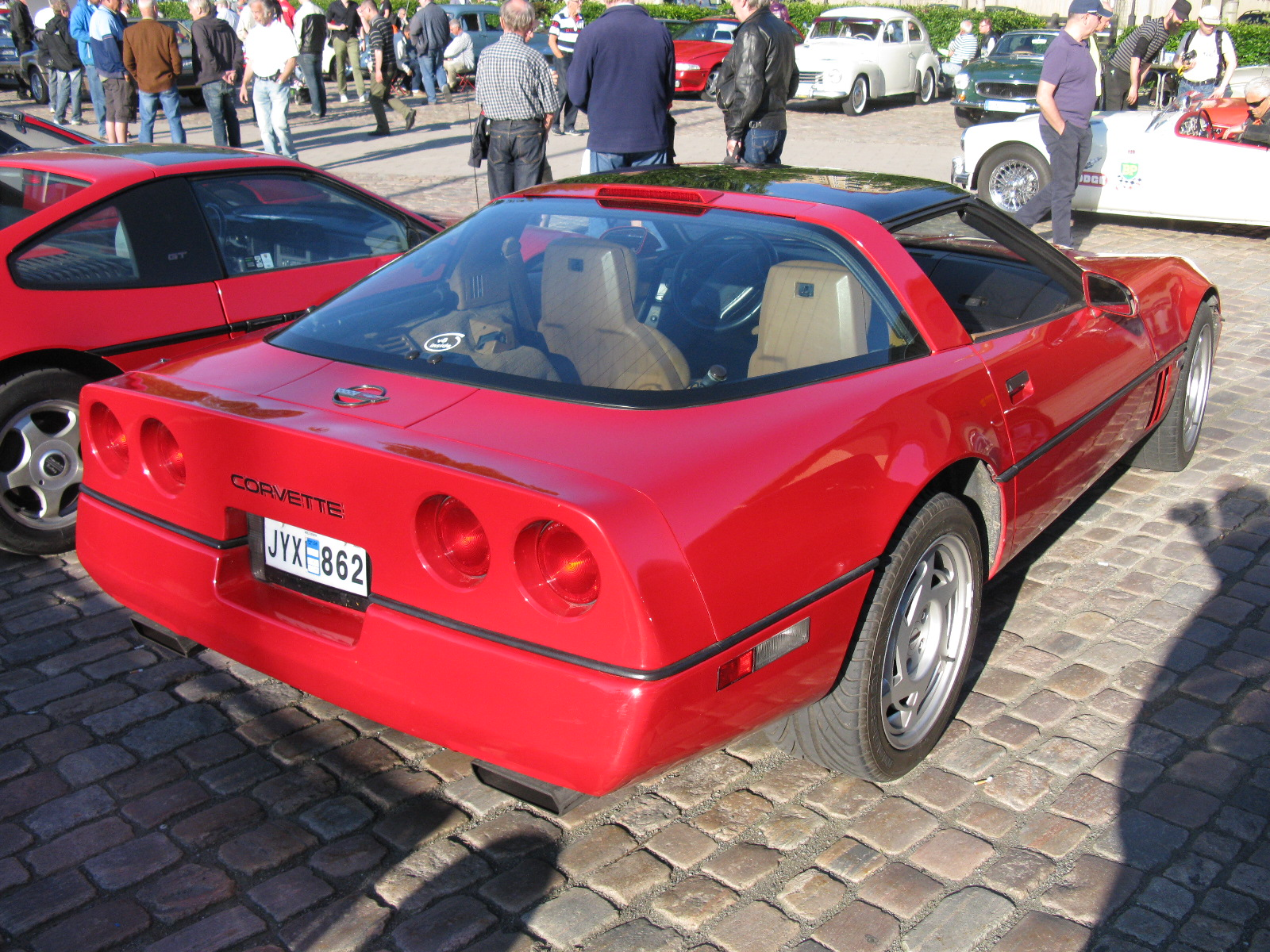 Chevrolet Corvette 1990